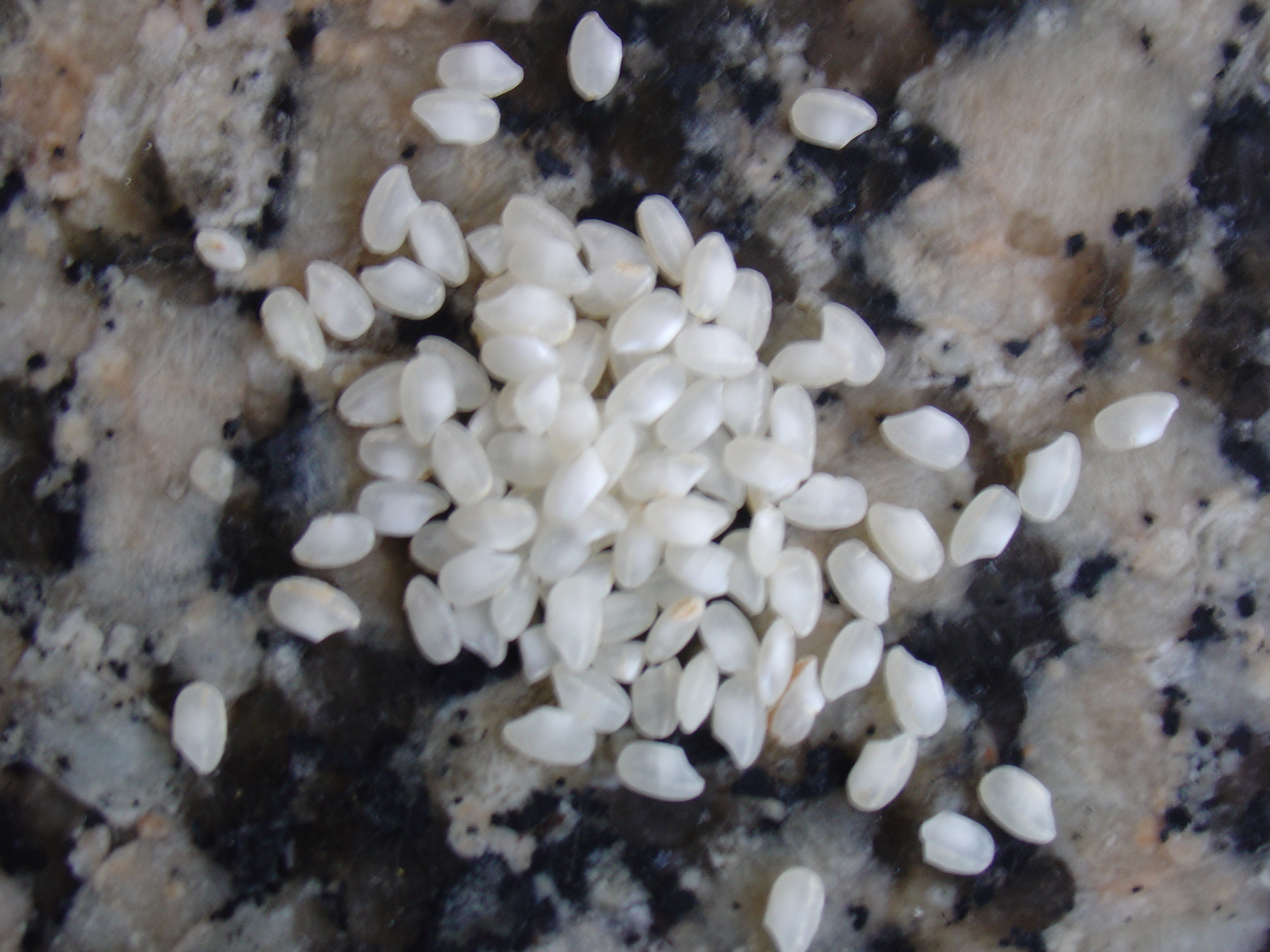 Arroz (Oryza sativa) bomba de Calasparra, Murcia, Spain; spanish rice cultivar.